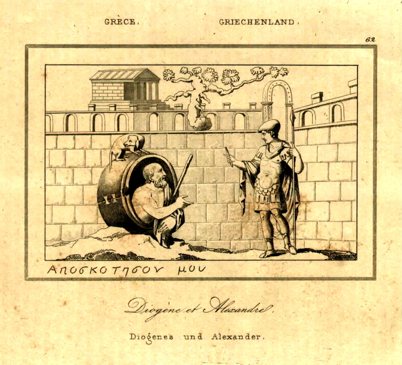 Alexander old drawings